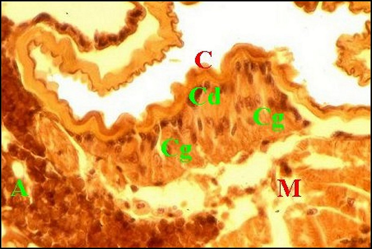 Glande postéro-dorsale d'un pédicule de Meta, coupe histologique